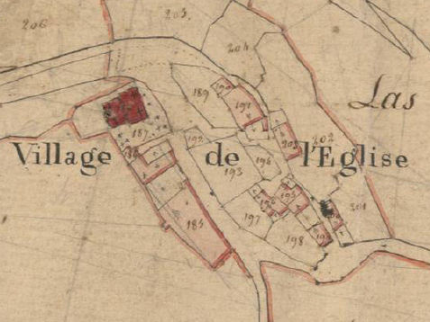 El Veïnat de l'Església en el Cadastre napoleònic del 1812 (Arxius Departamentals dels Pirineus Orientals)